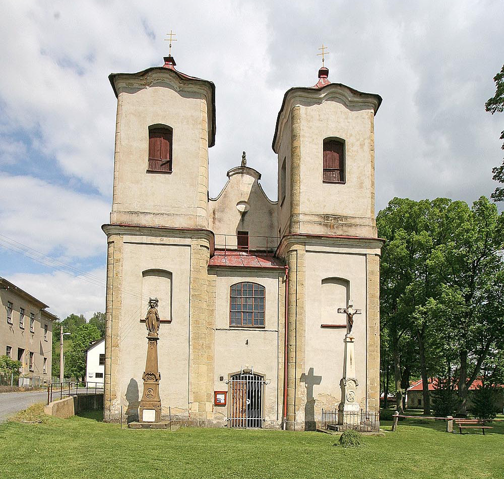 Kostol Všetkých svätých - Bělá nad Svitavou